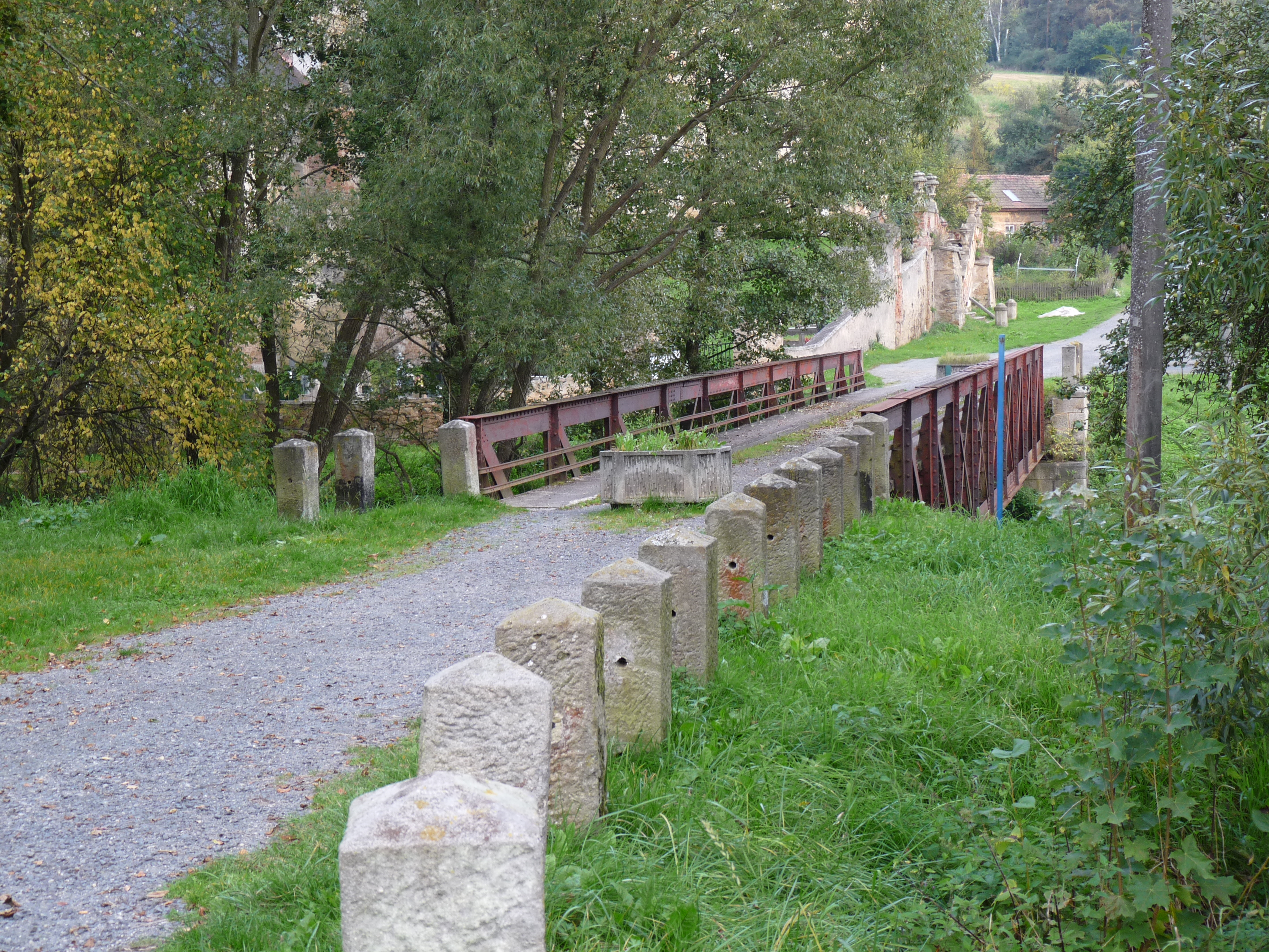 Most a mostek přes náhon a patníky, přes Manětínský potok, Manětín.